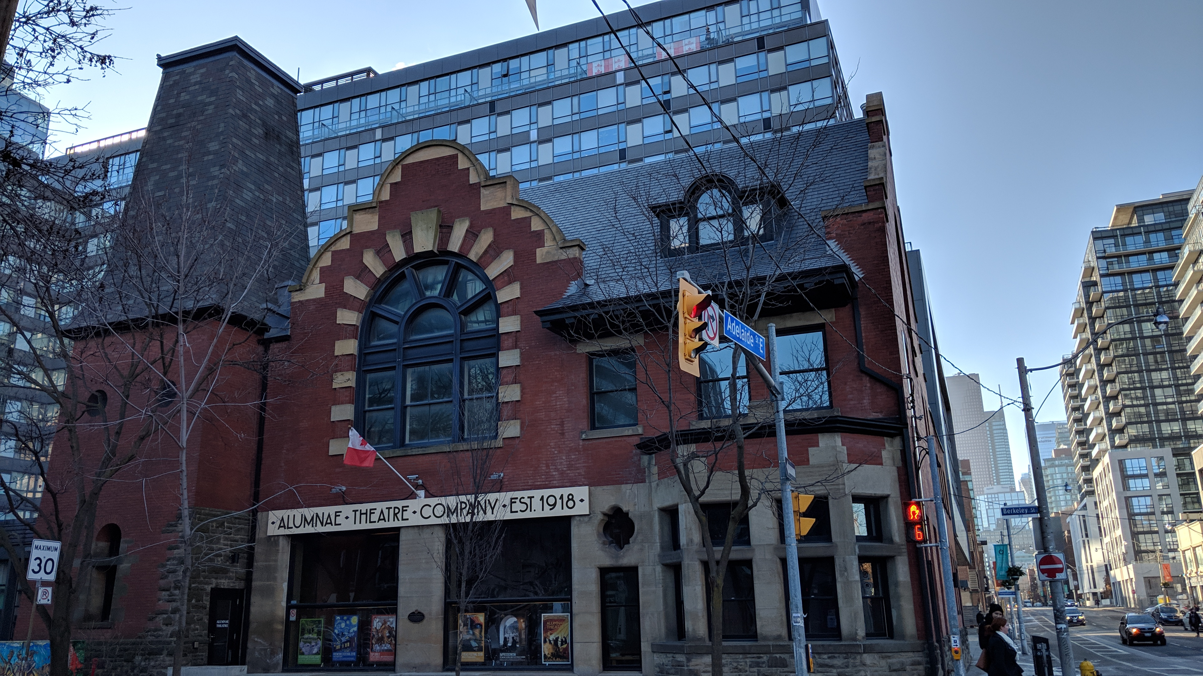 IMG_20190104_142837